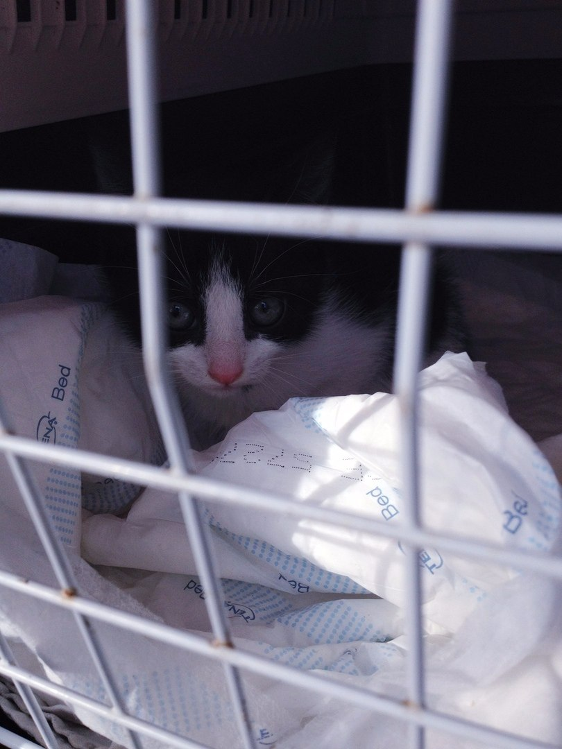 Kass ravimine